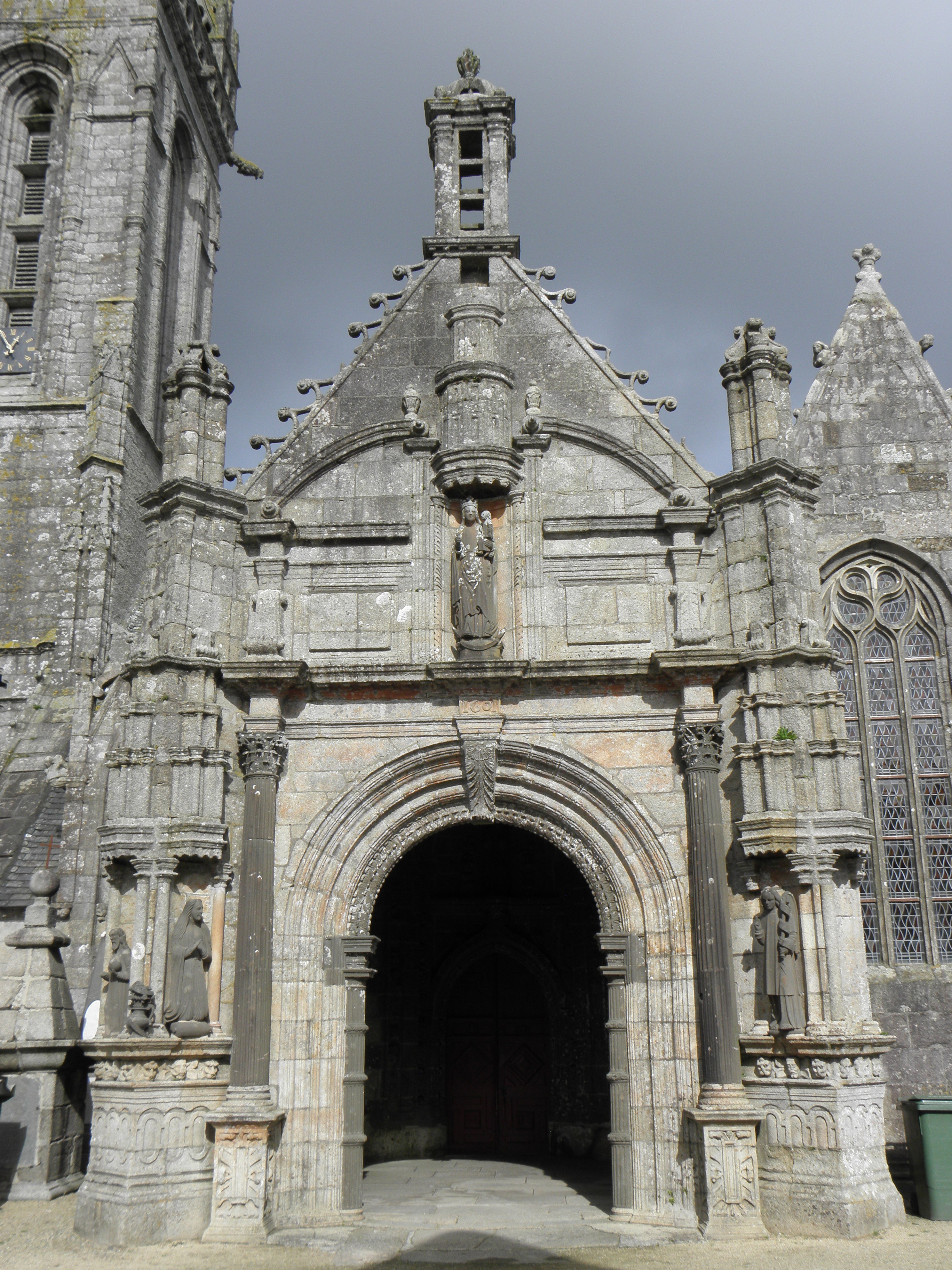 Porche sud de l'église Notre-Dame de Bodilis (29). .